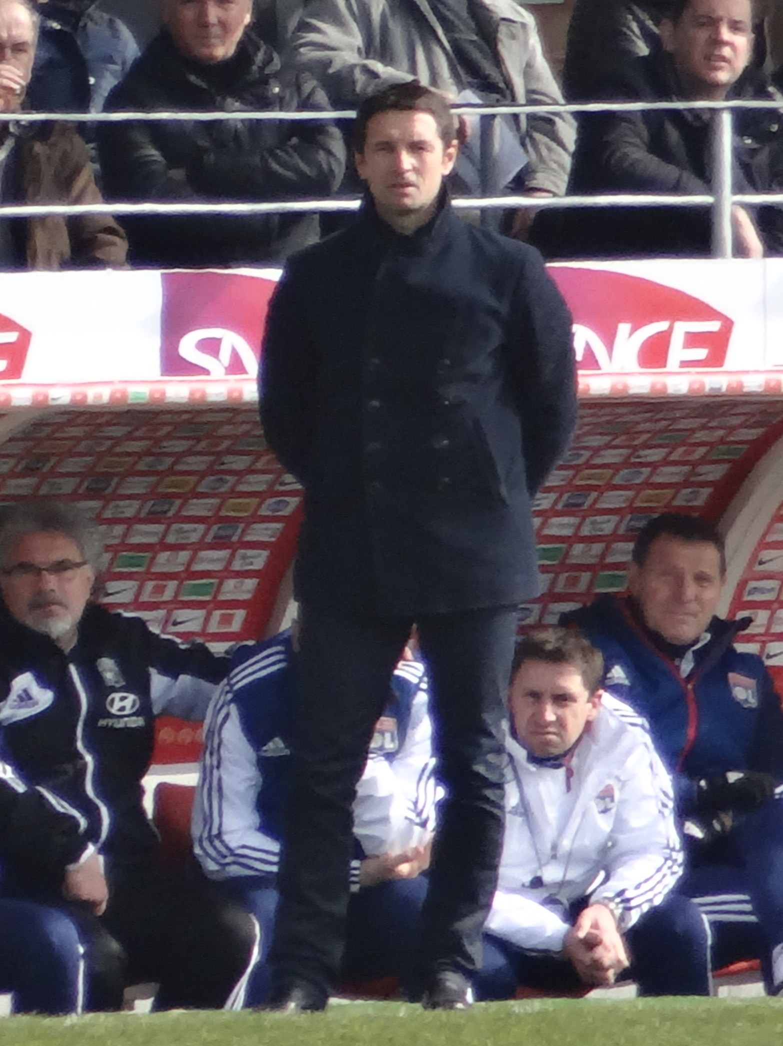 Match de football (Ligue 1) entre le Stade brestois 29 et l'Olympique lyonnais, le 3 mars 2013